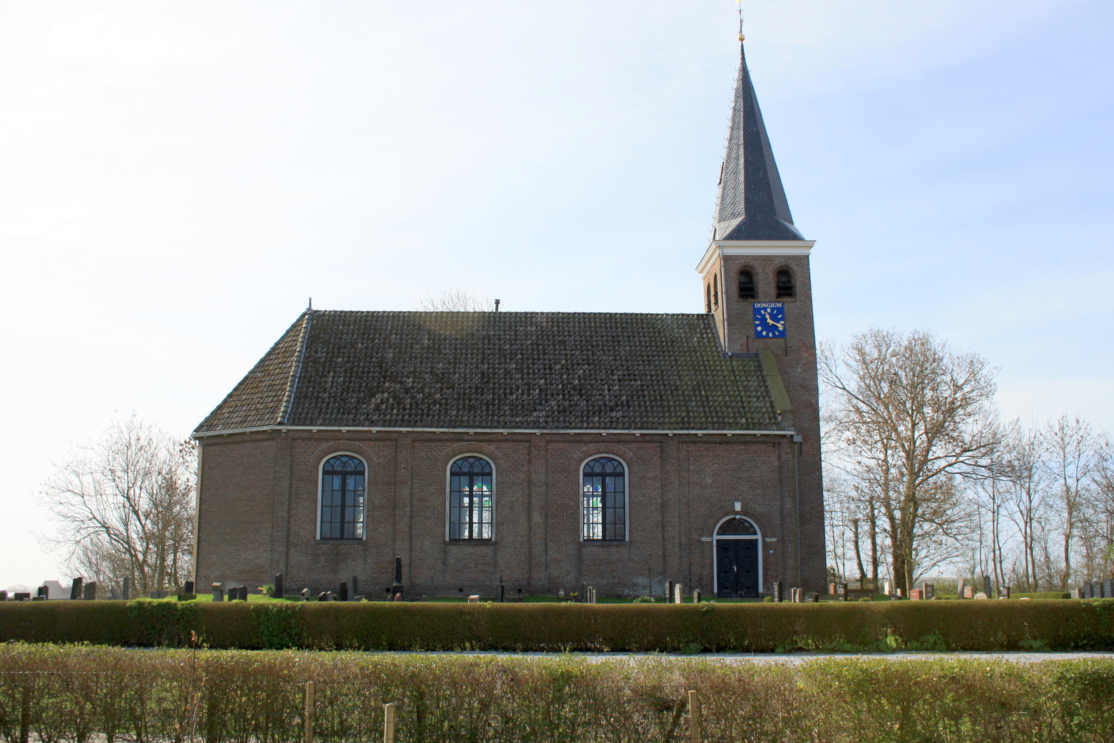 NH kerk in Dongjum (Franekeradeel)